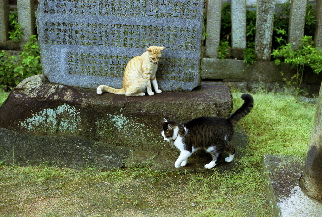 尾道猫猫劇場／御袖天満宮